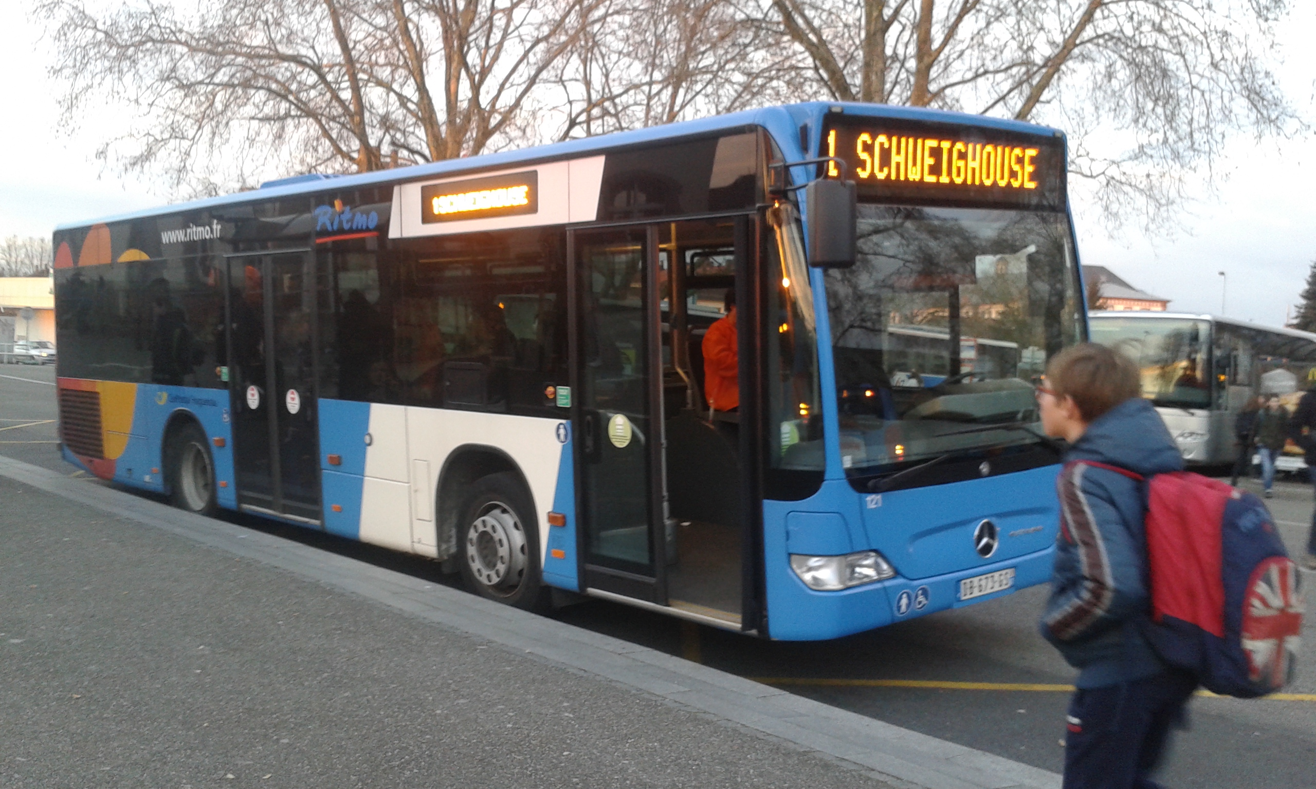 Matériel roulant du réseau Ritmo à la Gare de Haguenau